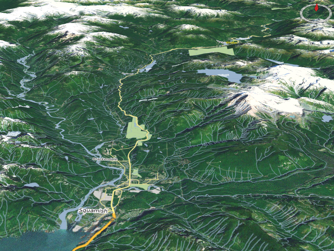 De gauche à droite (d'ouest en est) : La vallée de la Squamish, la chaîne du mont Cayley, la vallée de la Cheakamus qui est un affluent de la Squamish, le lac Garibaldi et le mont Garibaldi. Au premier plan, la ville de Squamish et l'embouchure de la Squamish dans la Horseshoe Bay au nord de Vancouver (invisible sur l'image), au Canada. La route principale (en jaune) est la Highway 99, aussi appelée « Sea-to-Sky road ».